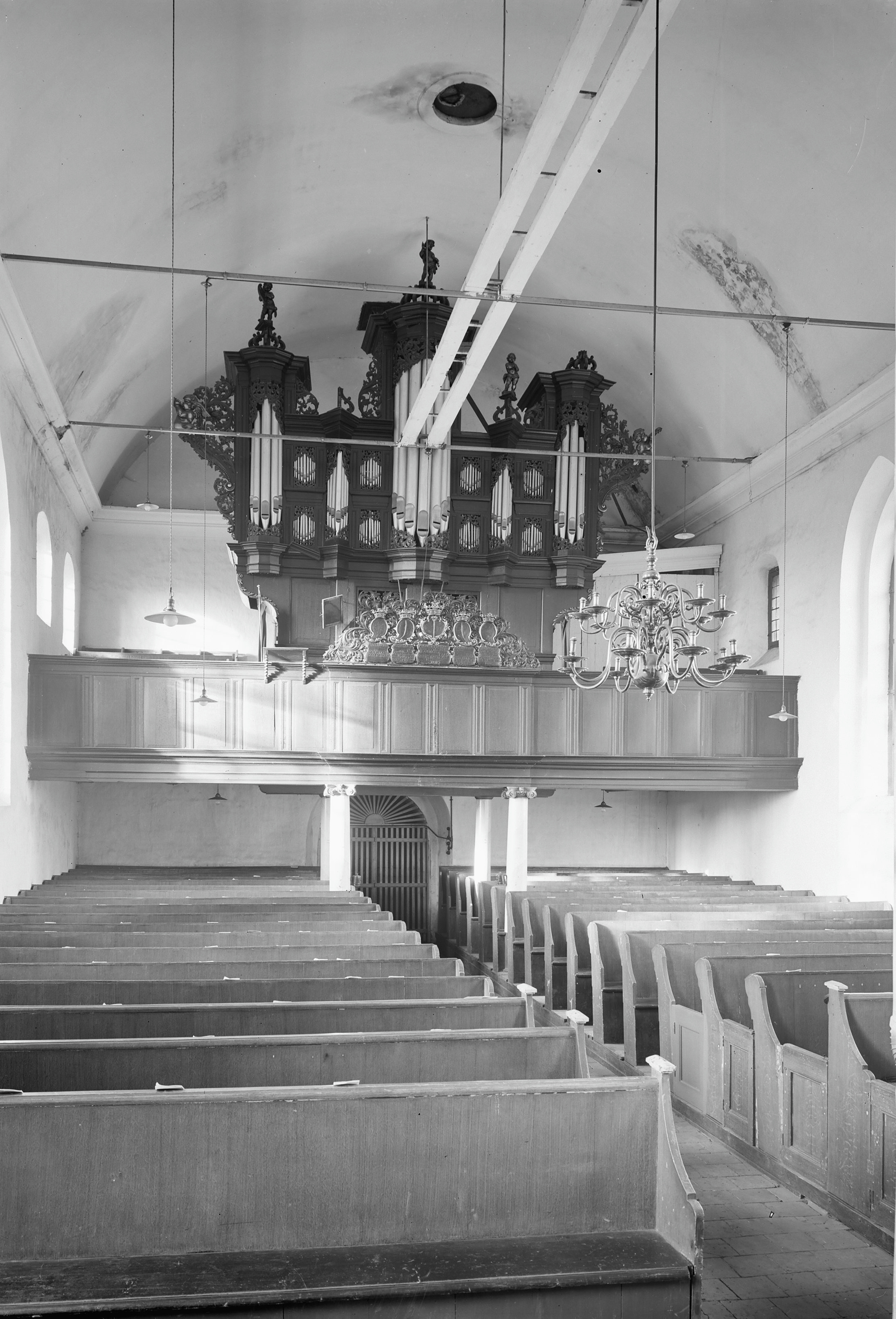 N.H.Kerk: inwendig schip naar het westen